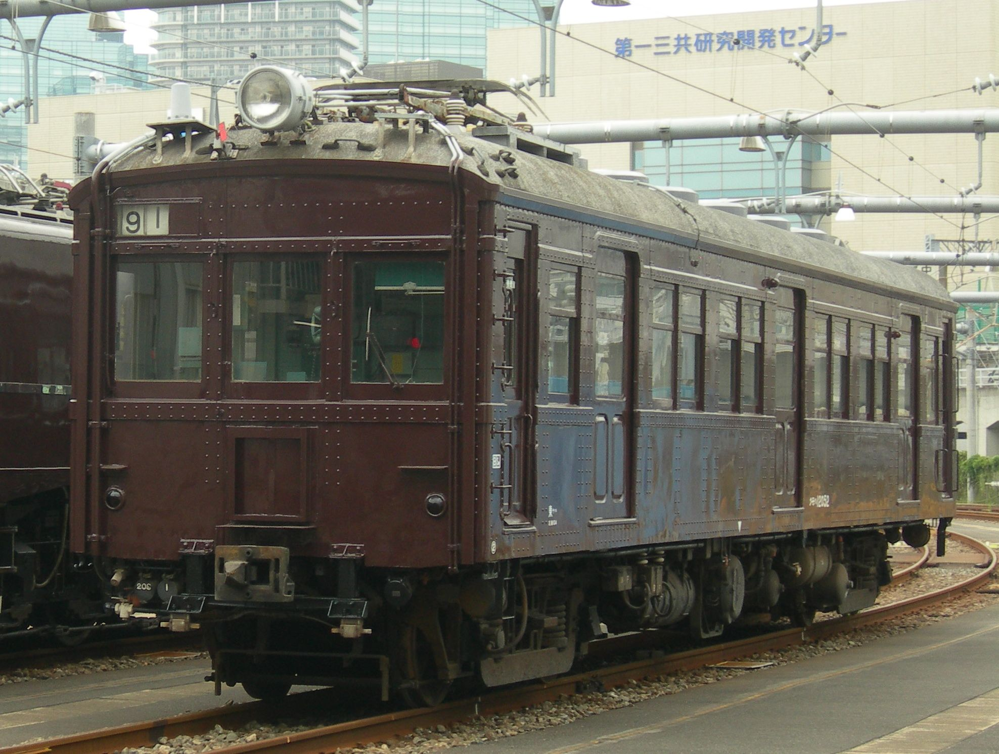 国鉄クモハ12052